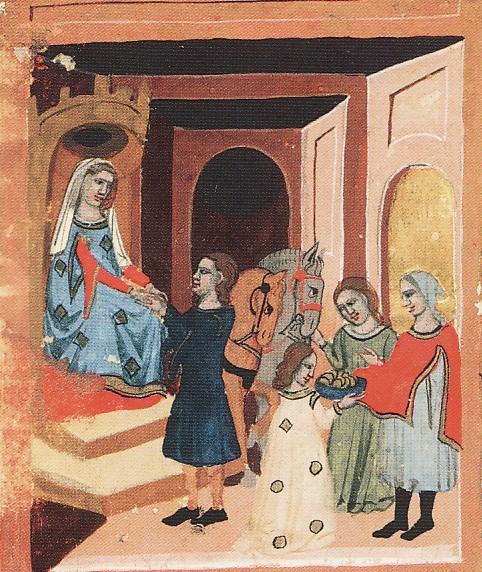 Drahomíra dává Tunnovi a Gomonovi koně a stříbro, aby zabili sv. Ludmilu